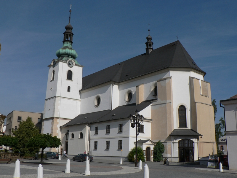 Kostel Navštívení Panny Marie (Svitavy).